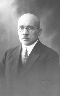 Johannes Adamson